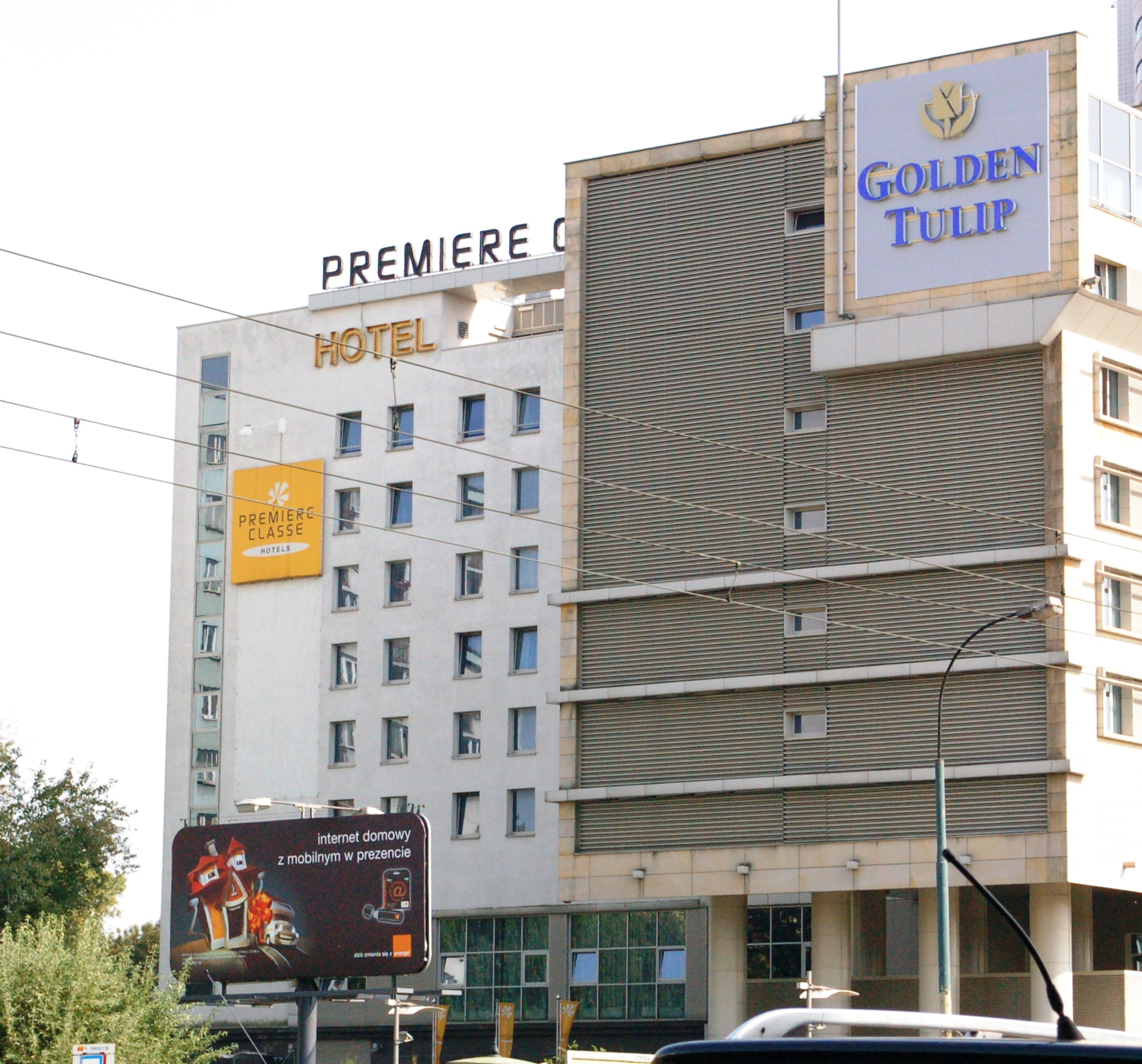 Hotel Golden Tulip, vormals Hotel Kyriad Prestige in Warschau